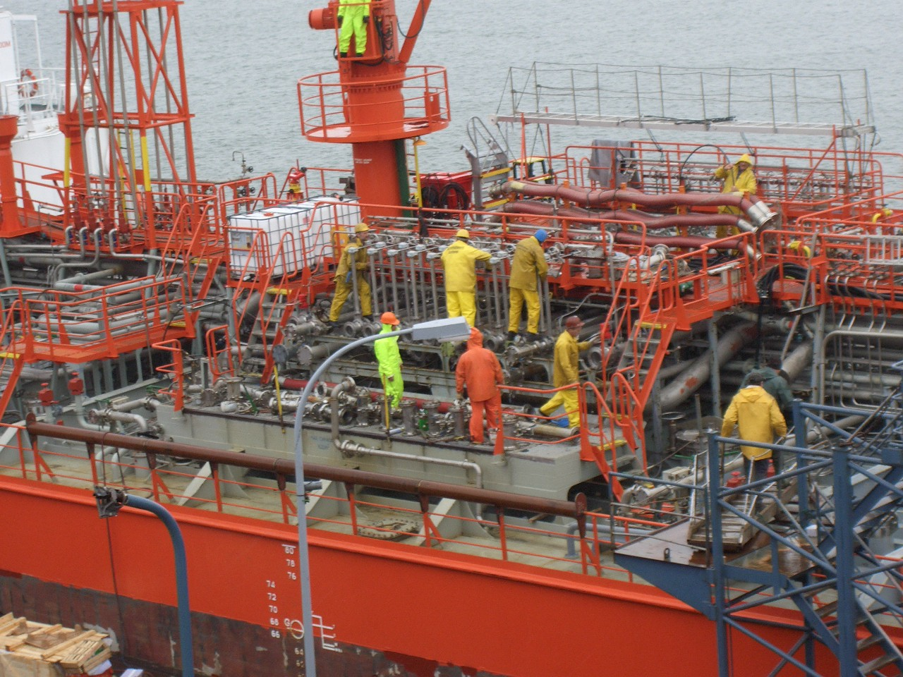 Menschen bei der Ausübung einer Erwerbstätigkeit. Kampfanzug See.